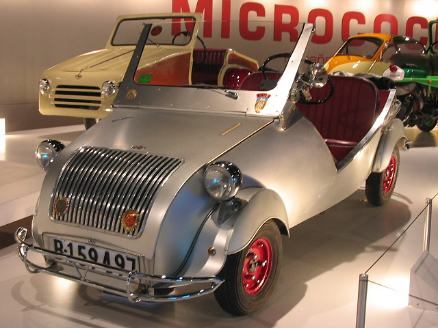 *Marca: Biscuter Modelo: 100 Año: 1954 Fabricante: Autonacional, S.A. (Barcelona) Producción estimada: alrededor de 12000 de todos los modelos Propiedad: Jaume Jubert. Manresa (Barcelona)